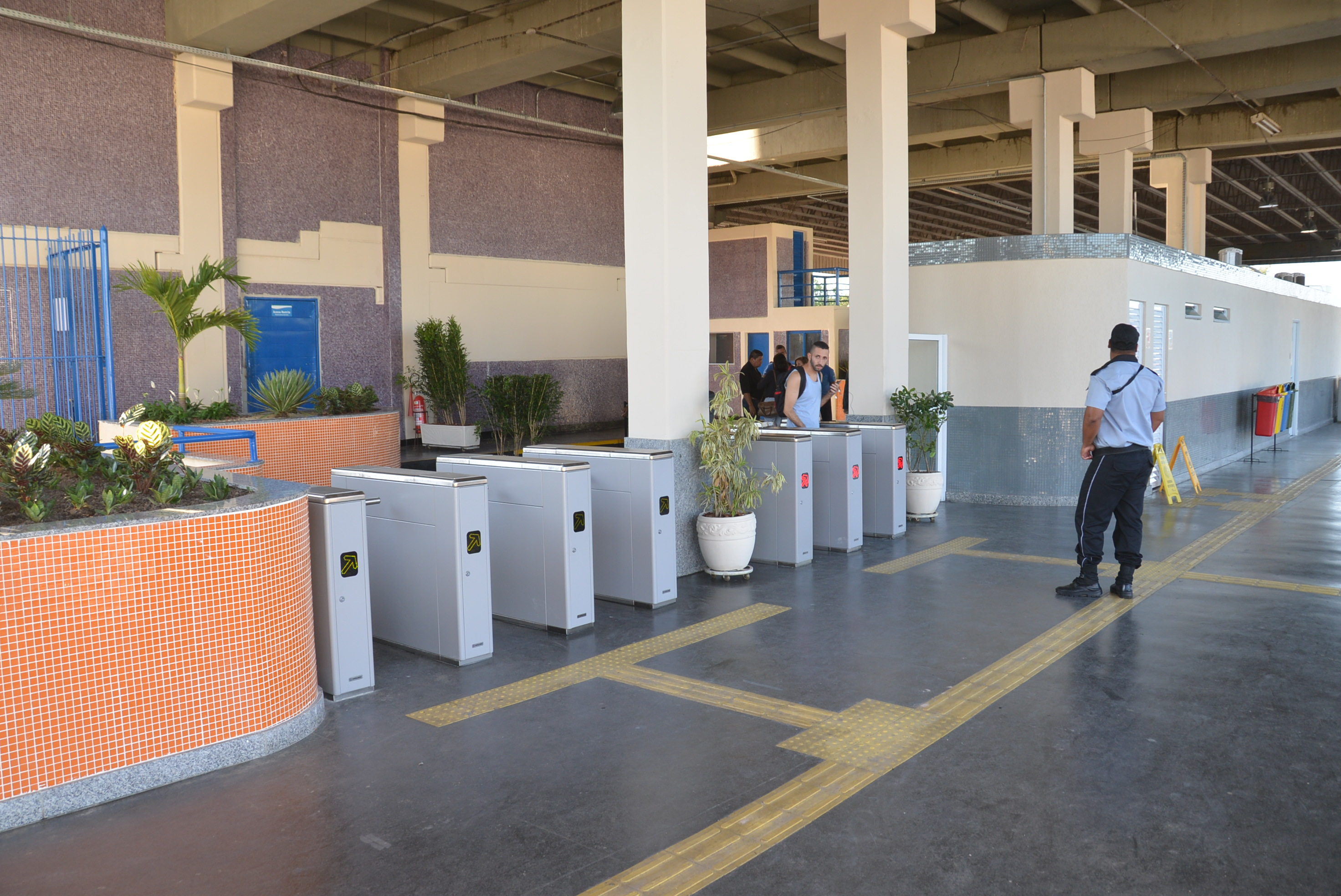 Estação Saracuruna no dia 08 de junho de 2015.